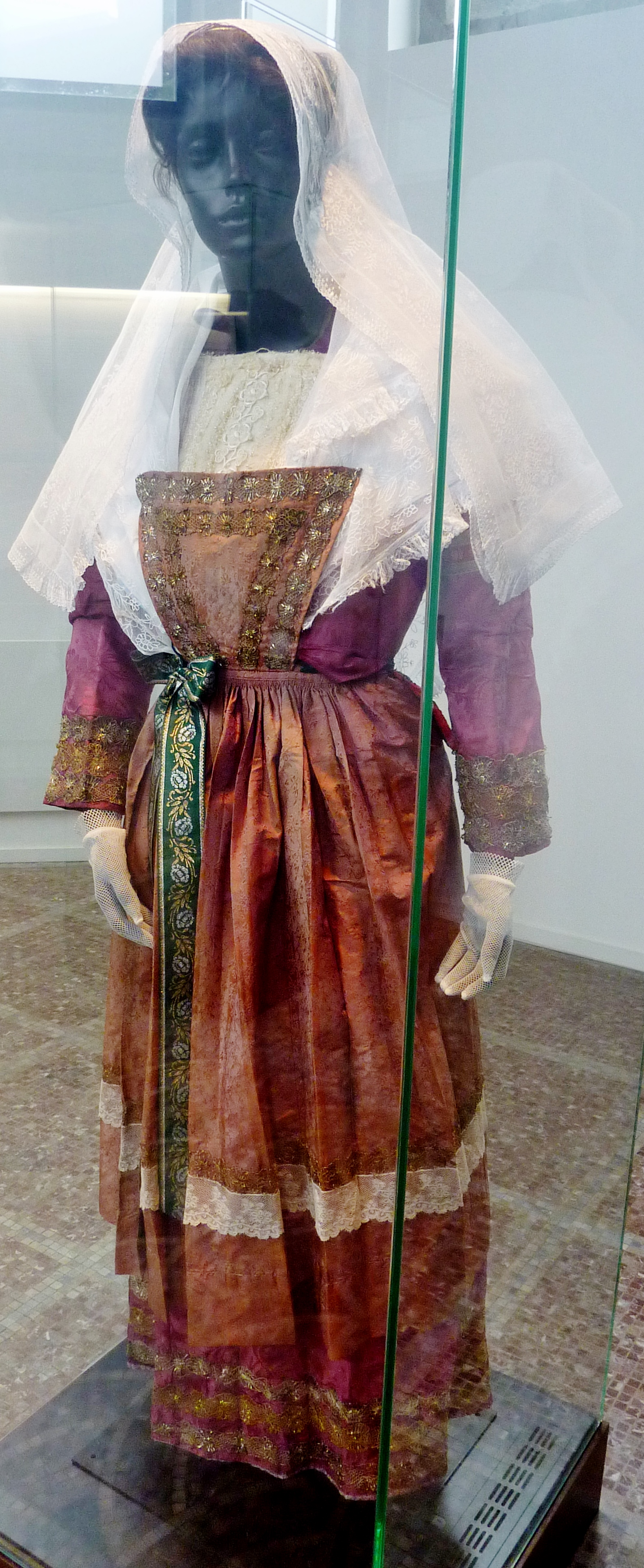 Costume de Plounéour-Trez avec coiffe kernapa (début XXe siècle, musée du Léon de Lesneven). Costume du pays pagan en damas rouge et violet ; la superposition des trois petits châles avait une signification particulière : si le blanc était dessus, la femme n'était pas mariée ; si c'était le rose, cela signifiait qu'elle avait eu une fille dans l'année, contrairement au bleu qui annonçait un garçon. La coiffe, composée d'une multitude d'accessoires, était très complexe.